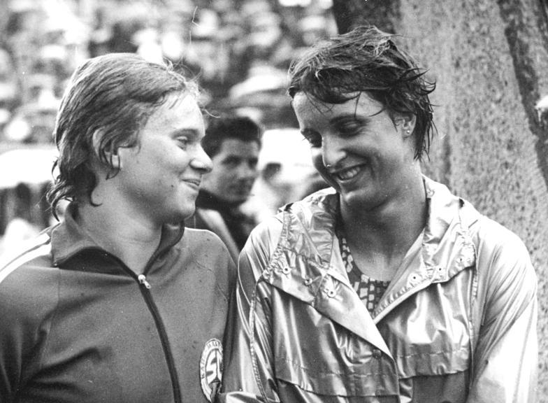 Petra Thümer, Barbara Krause ADN-ZB Gahlbeck 9.7.77 Leipzig: 28. DDR-Meisterschaften im Sportschwimmen in Leipzig. Einen neuen Weltrekord über 800 m Freistil schwamm Petra Thümer (SC Karl-Marx-Stadt- links) mit 8:35,04 min. Die alte Bestmarke der Olympiasiegerin von Montreal stand auf 8:37,14 min. Rechts Barbara Krause von SC Dynamo Berlin, die in diesem Wettkampf Zweite wurde.